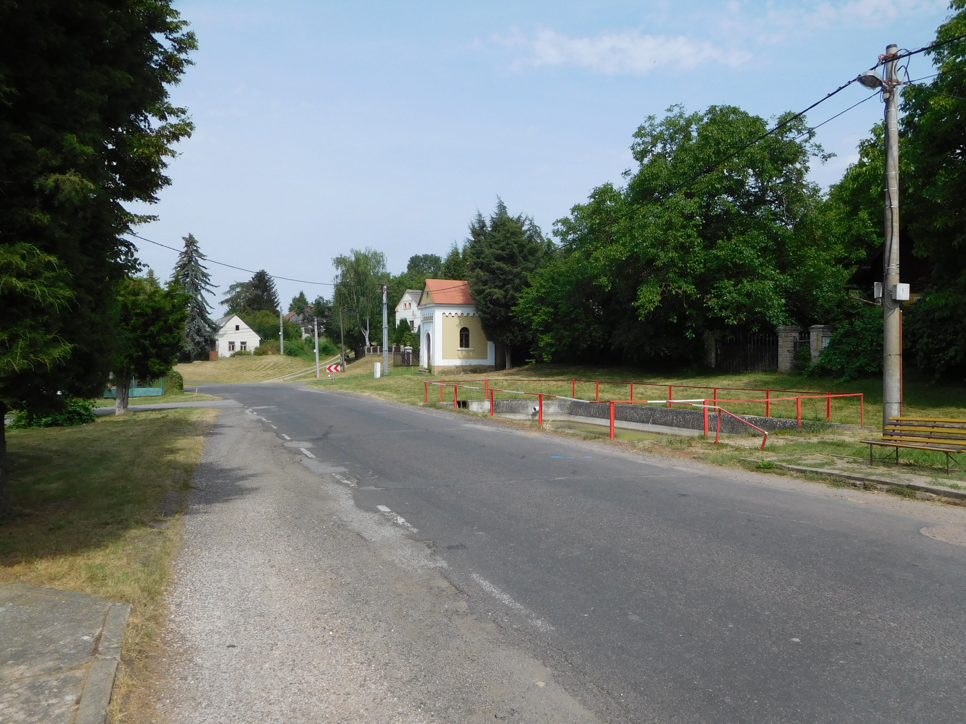 Horní Rokytňany - náves